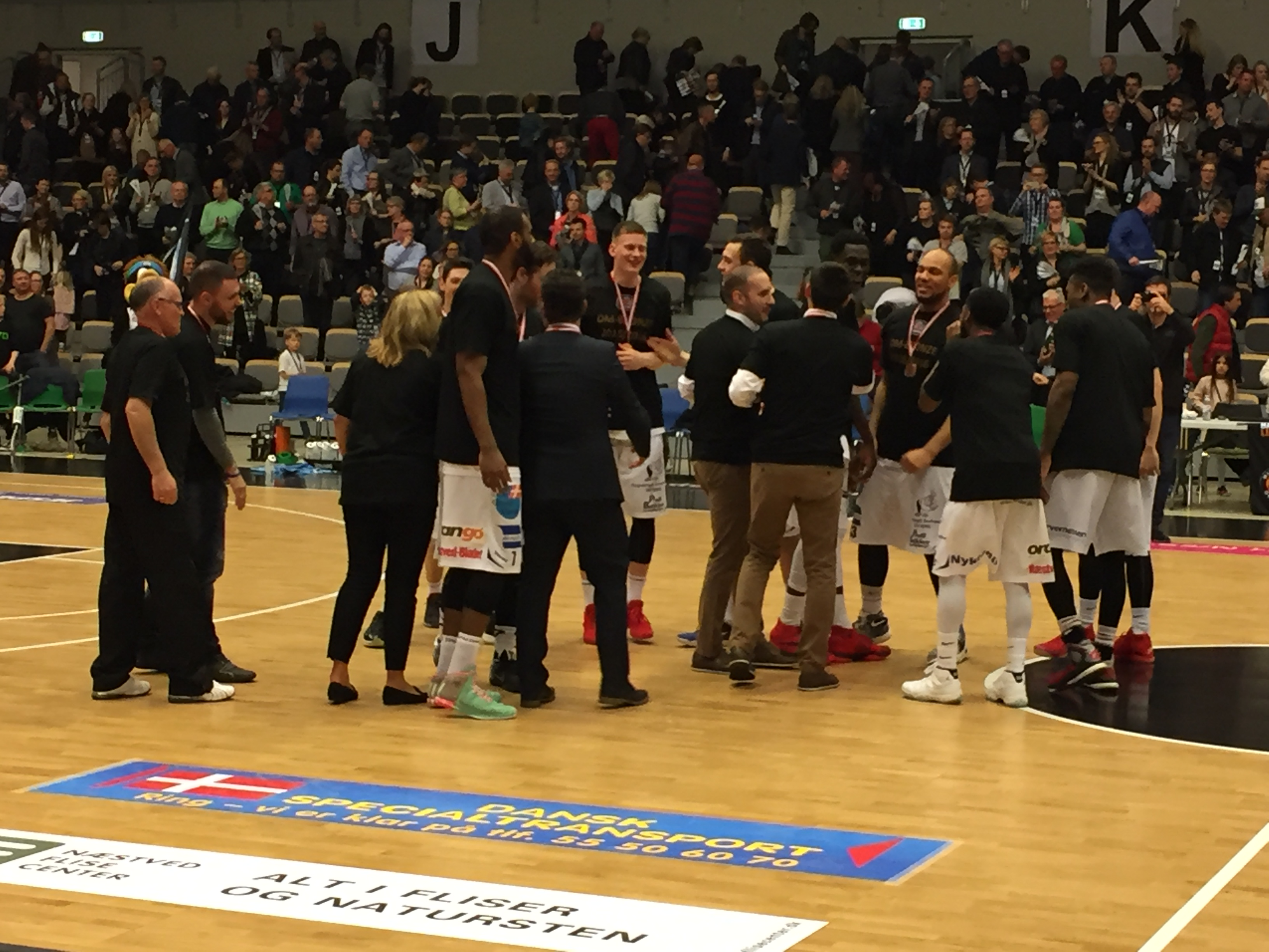 Billede taget efter medaljeceremonien i Næstved Park Arena, hvor Team Fog Næstved vandt bronzemedaljer over Hørshold 79ers med scoren 81-70